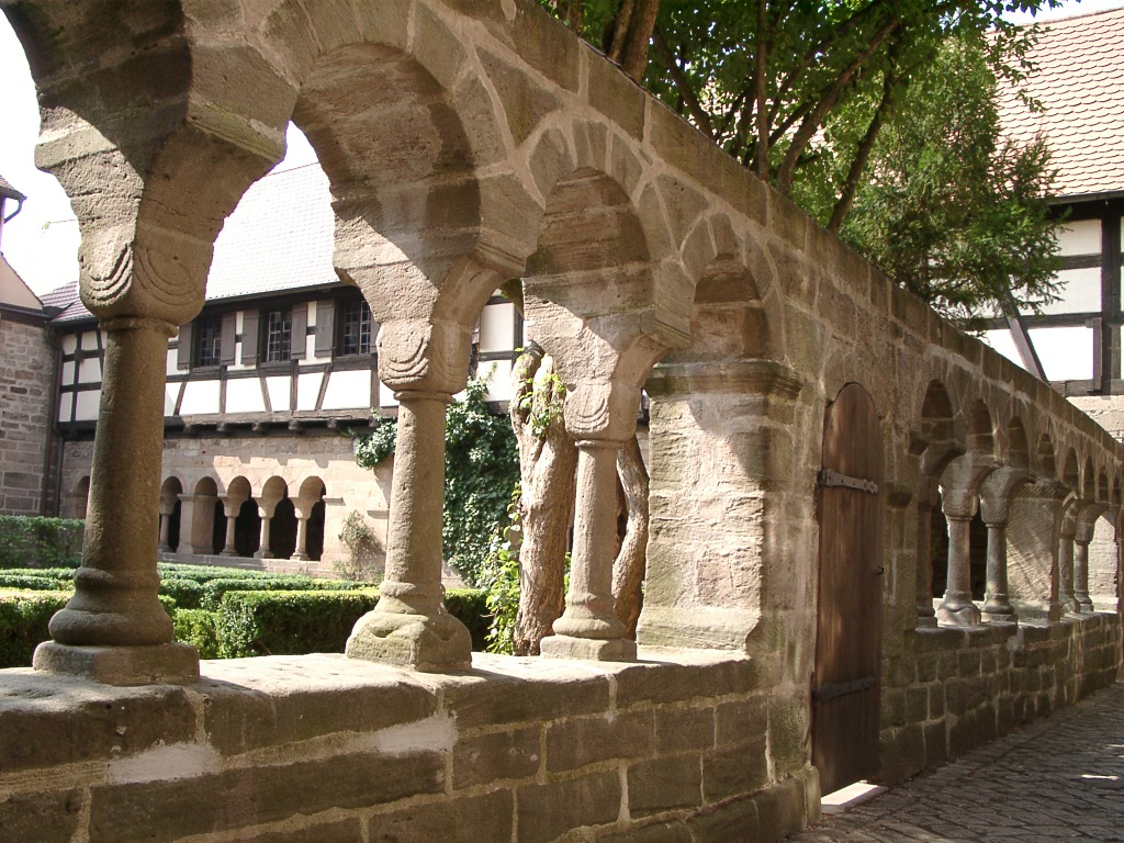 Romanischer Kreuzgang Feuchtwangen Erlaubnis wurde von der Tourist Information erteilt.